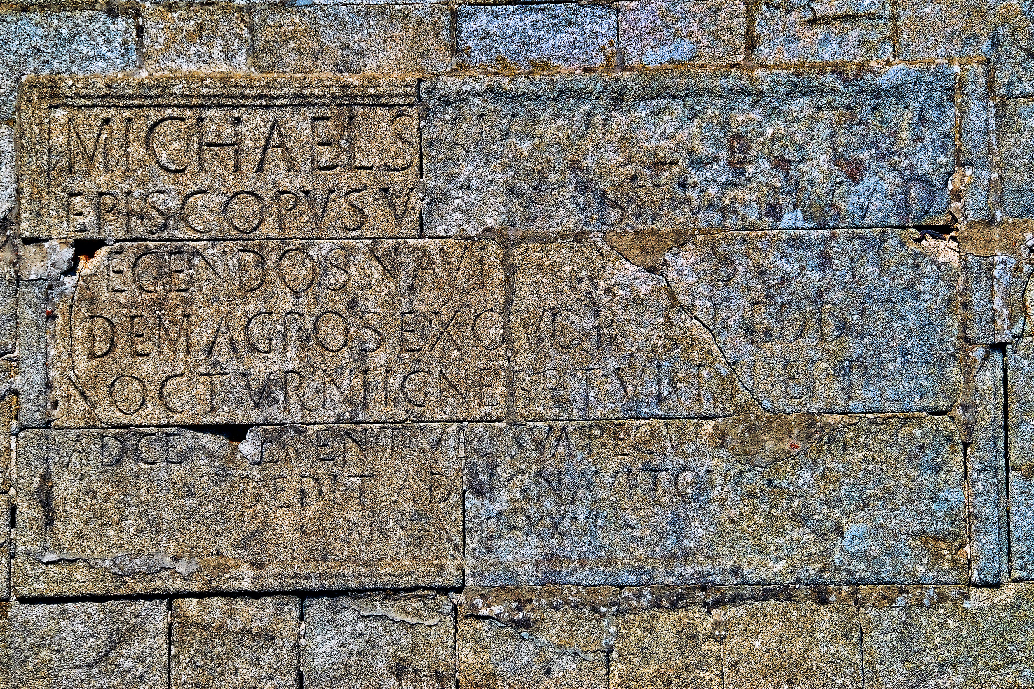 Torre, Capela, Farol ou Ermida de S. Miguel-O-Anjo - Inscrição na pedra da parede exterior da torre do Farol This file was uploaded for Wiki Loves Monuments in Portugal with the unique identifier 74770.